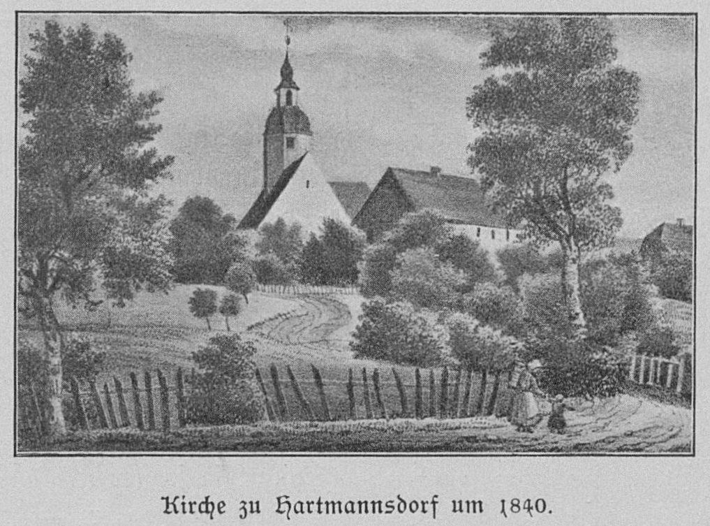 Die Johannes dem Täufer geweihte spätgotische Kirche wurde schon im Jahr 1500 erwähnt. Im zentral auf dem Kirchenschiff gebauten Dachreiter hängen die Glocken.